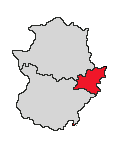 La Siberia en Extremadura